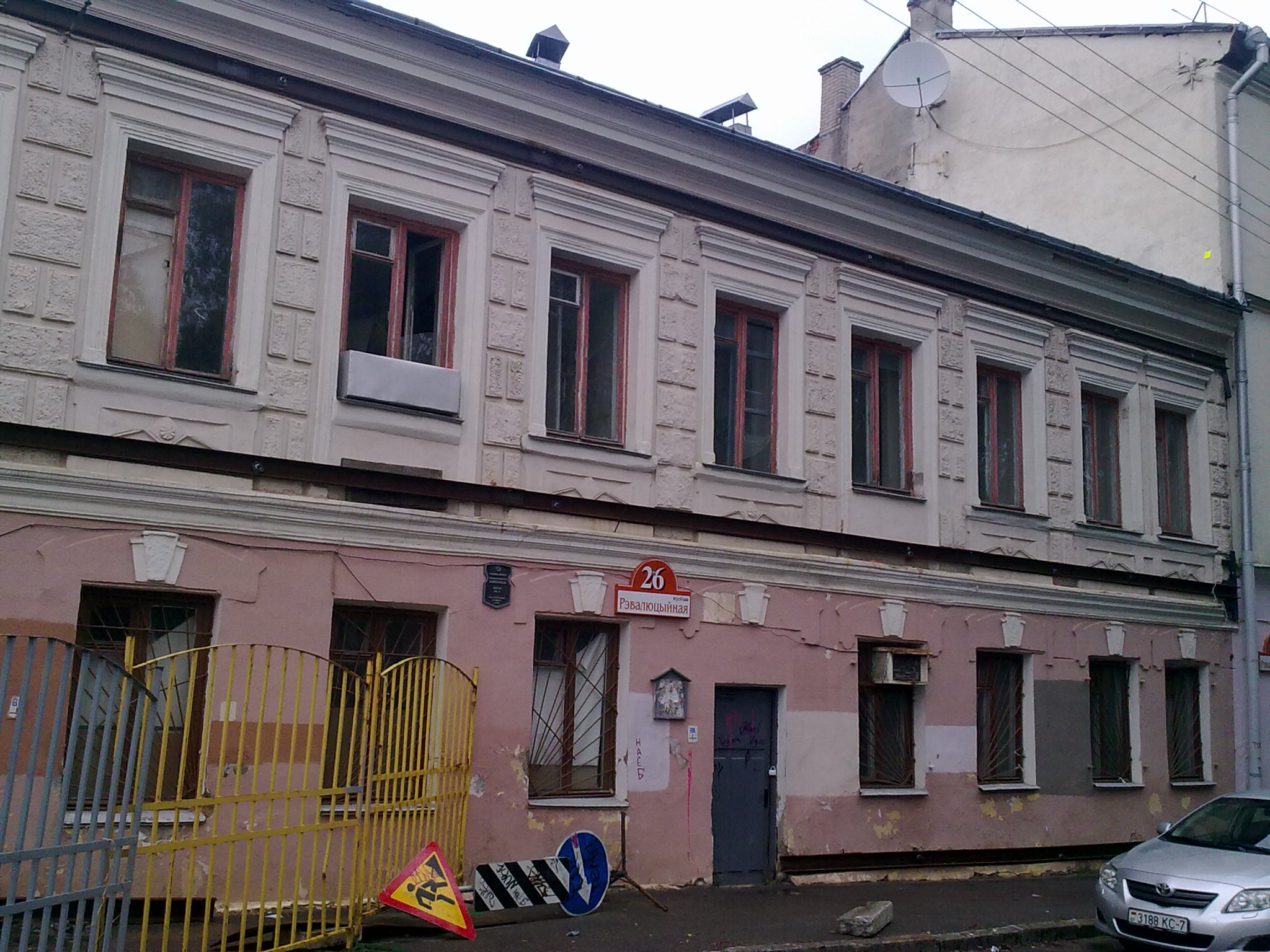 Мінск. вуліца Рэвалюцыйная. 2012